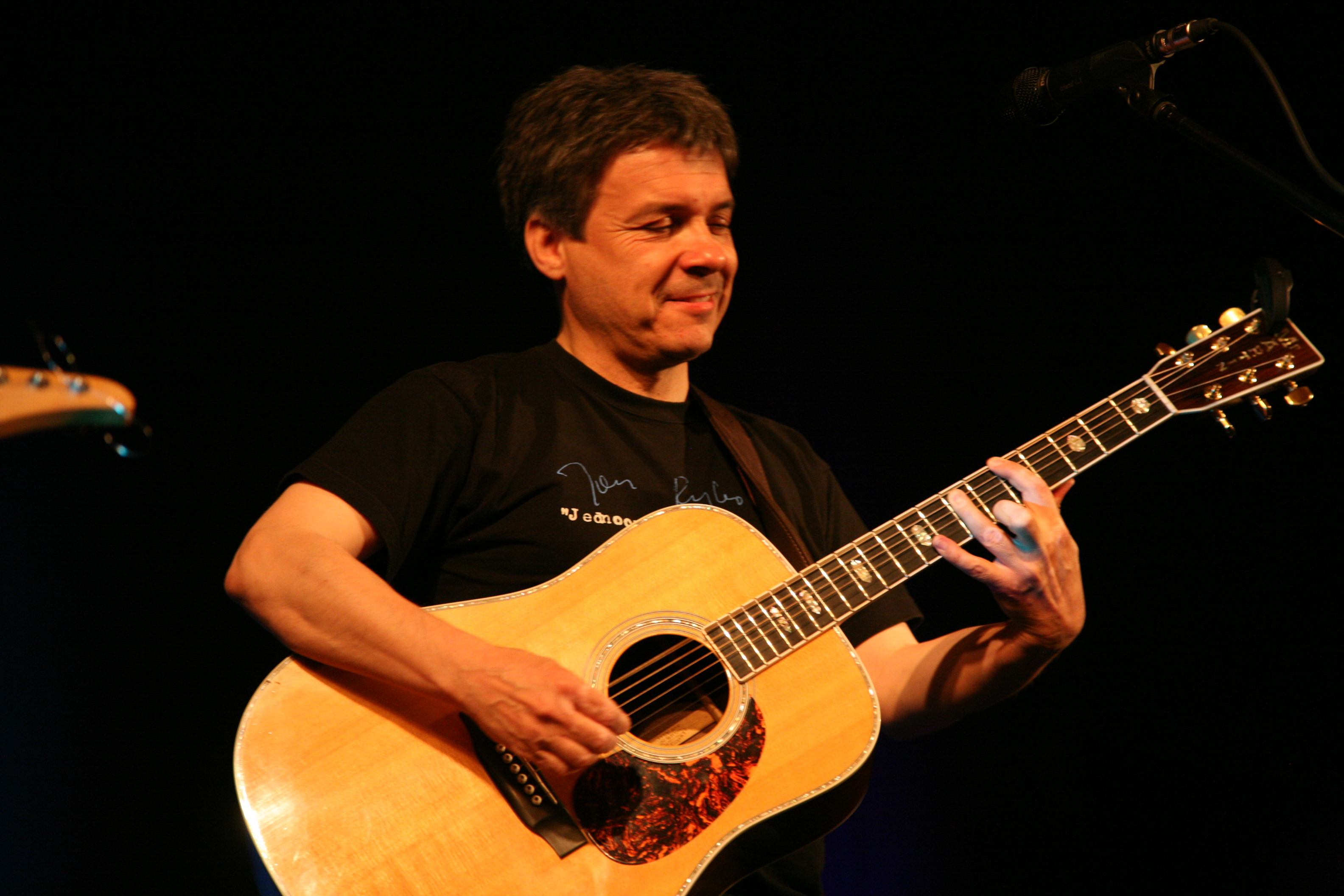 Krzysztof Myszkowski (muzyk)